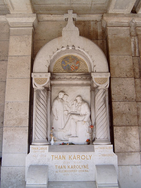 Than Károly sírja Budapesten. Istók János alkotása. Kerepesi temető: Á. B. 9.